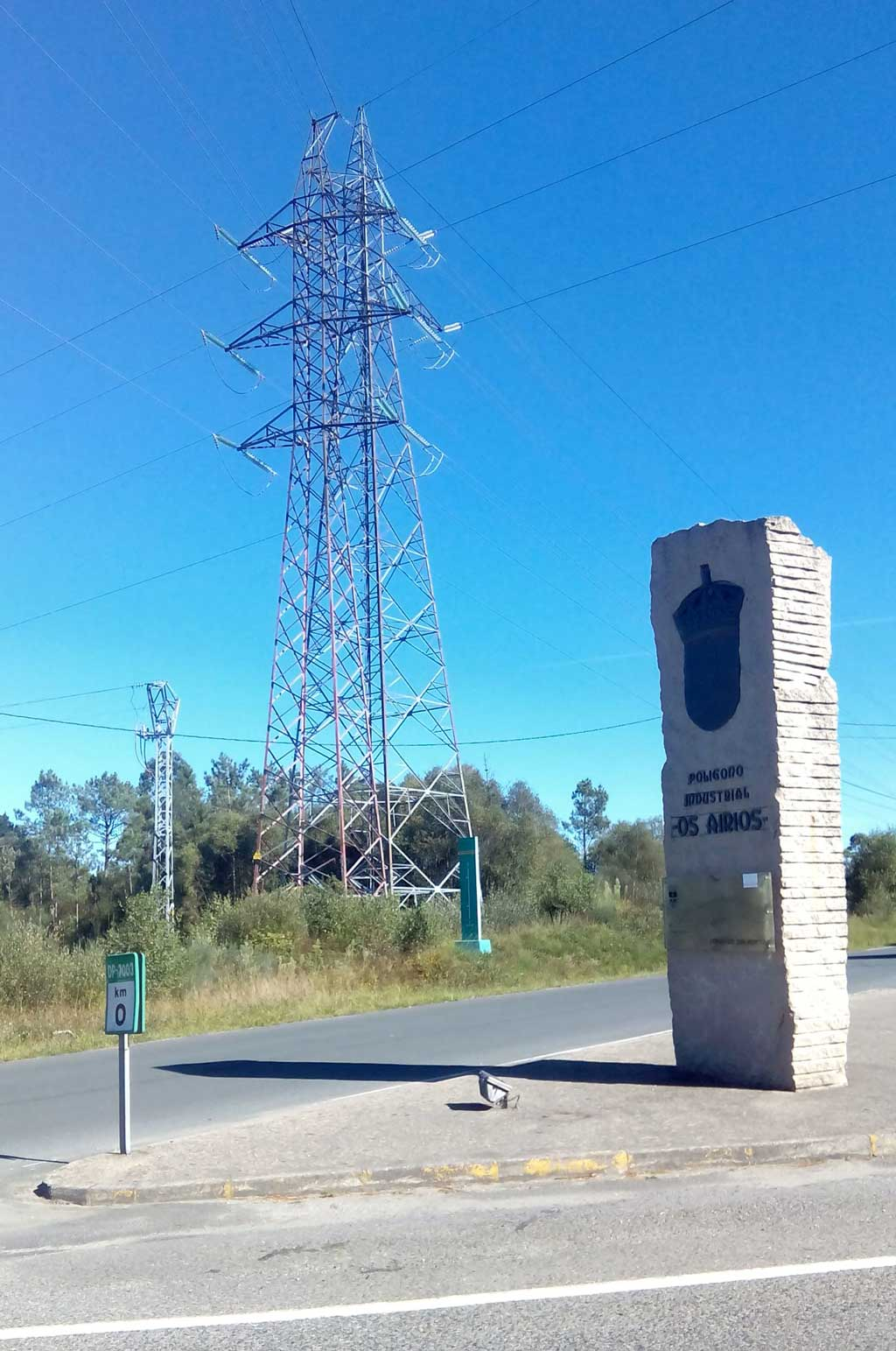 Polígono dos Airíos, As Pontes.